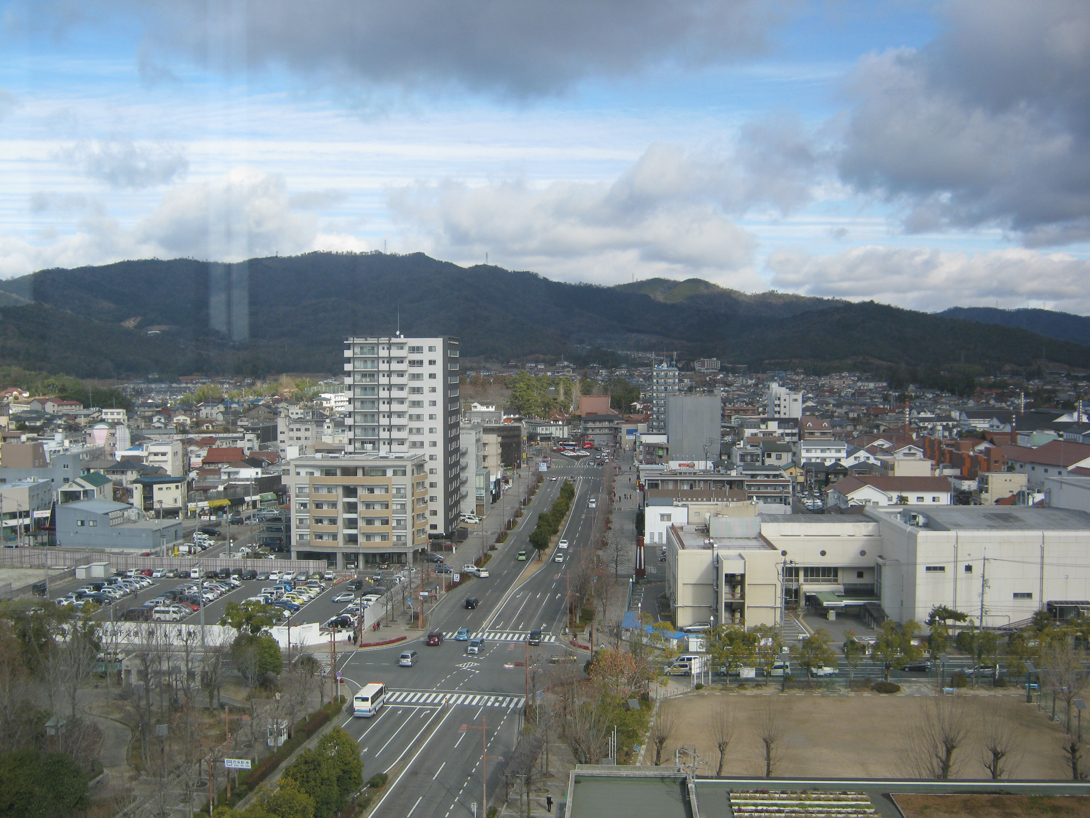 東広島市市役所10階から眺めたブールバール。